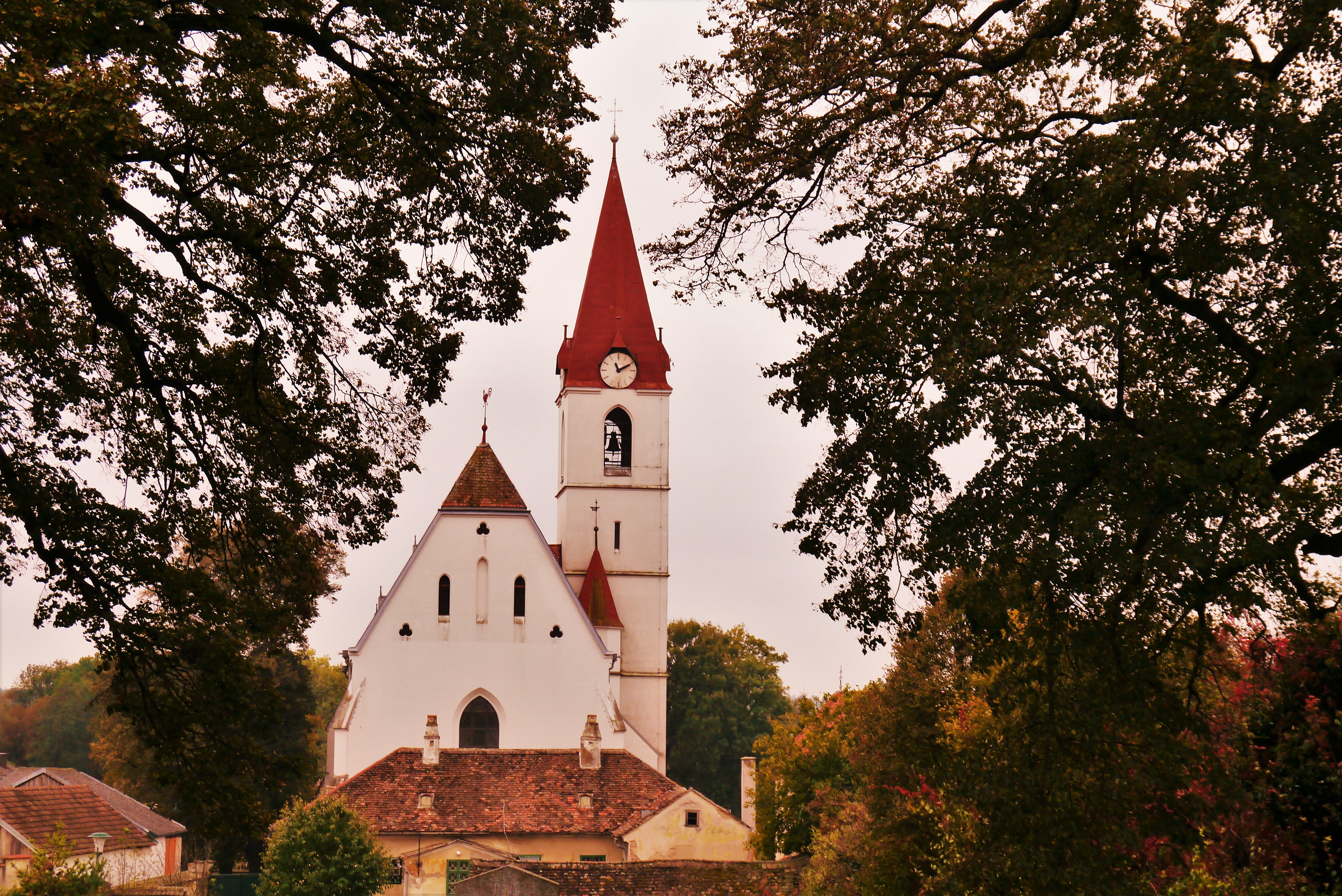 Der Bau der neugotischen Pfarrkirche von Enzersdorf im Thale wurde 1897 fertig gestellt.